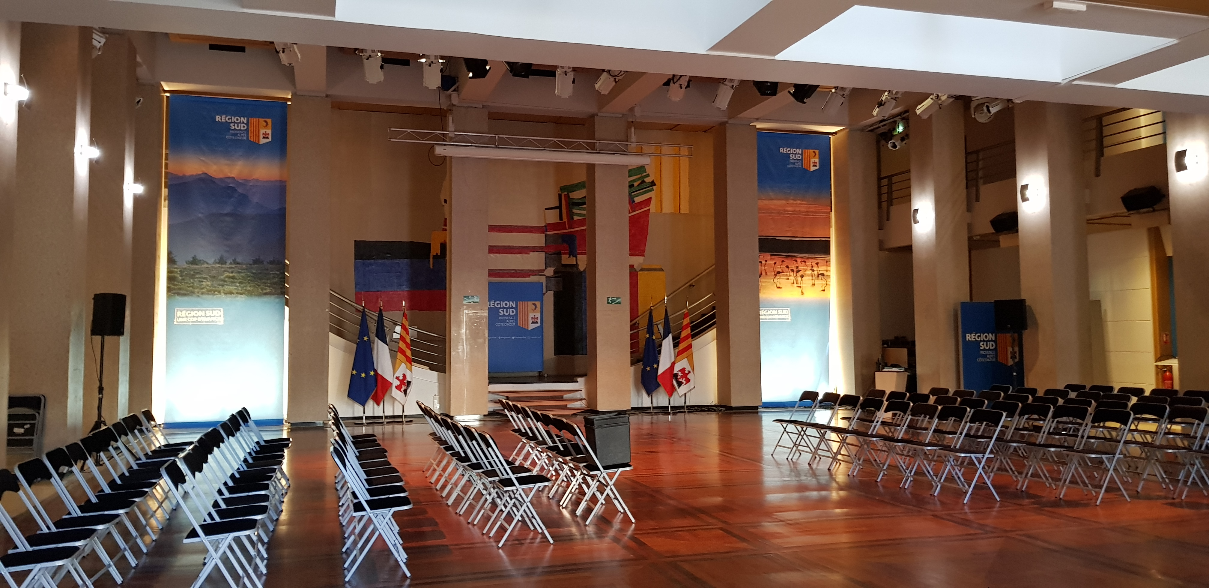 Vue d'une salle polyvalente de l'hôtel de la région PACA, on Marseille, France